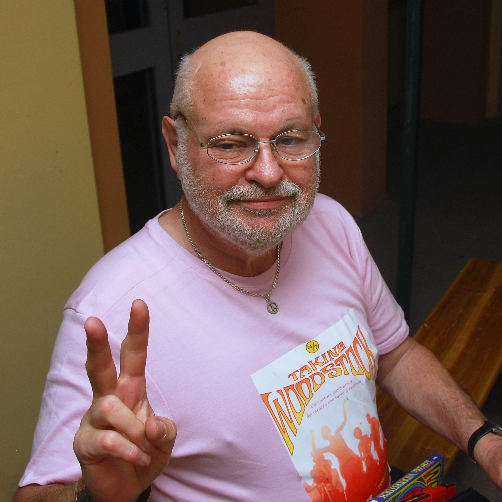 Elliot Tiber al Biografilm Festival